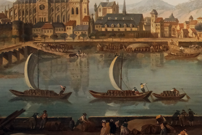 Scutes fluviaux remontant la Loir à Tours à l'approche du pont d'Eudes au XVIII° siècle - Détail d'un tableau offrant une vue panoramique de Tours, de Pierre-Antoine DEMACHY (Musée des Beaux-Arts de Tours) 1787